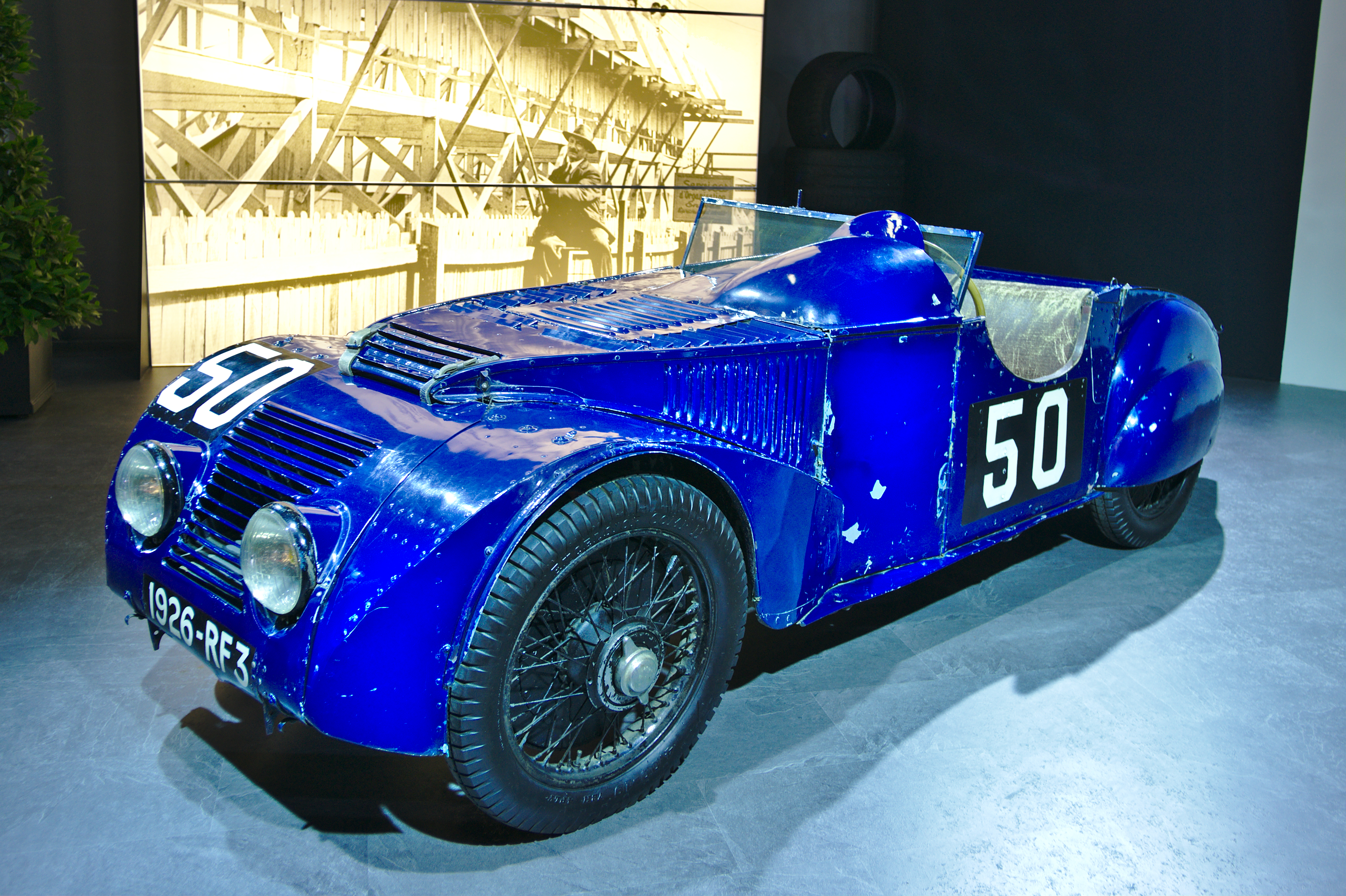 Salon de l'auto de Genève 2014 - 20140305 - Expo Le Mans